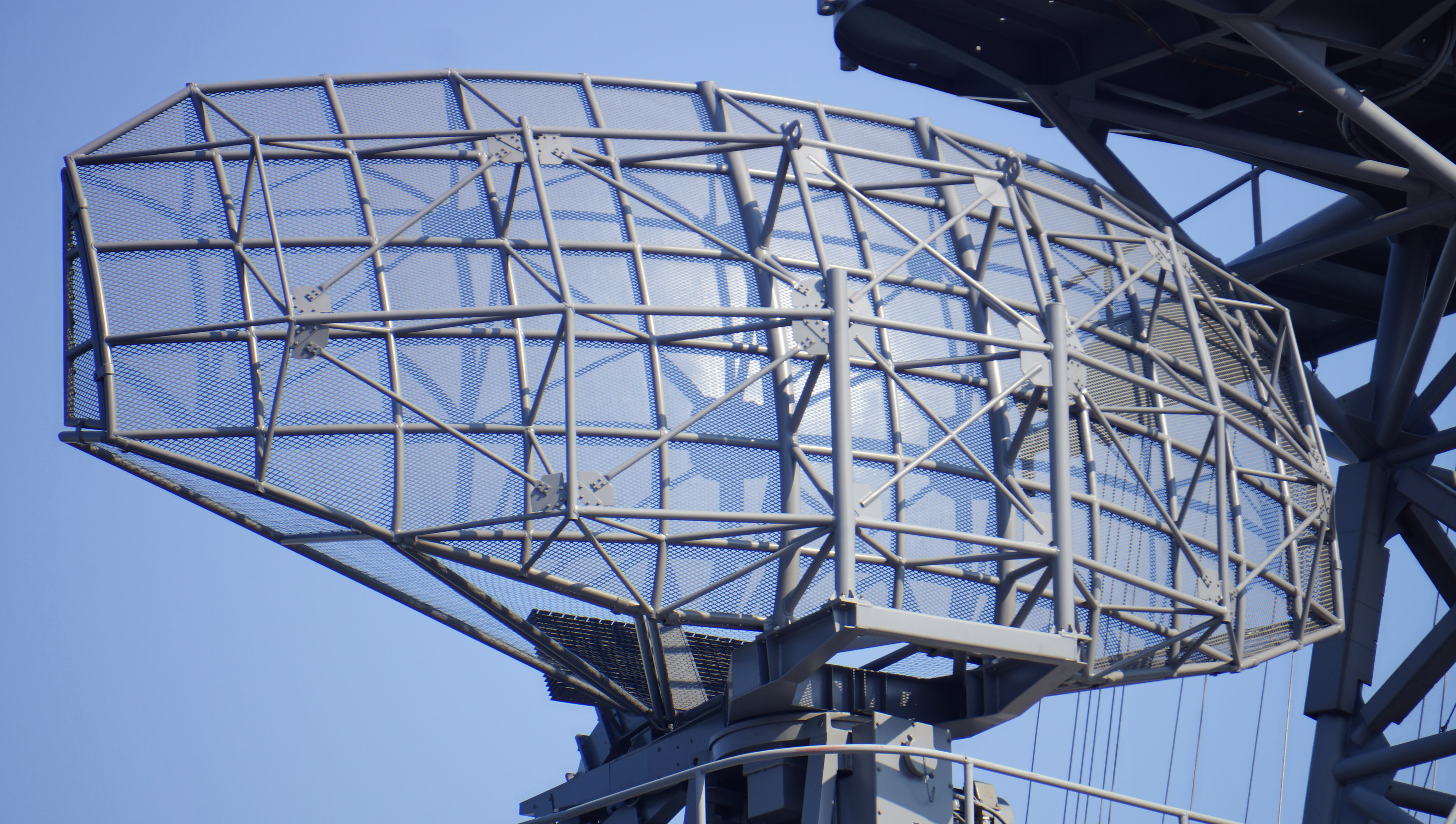 海上自衛隊 練習艦せとゆき（TV-3518） OPS-14B対空レーダー。 14年3月23日 天保山埠頭にて。